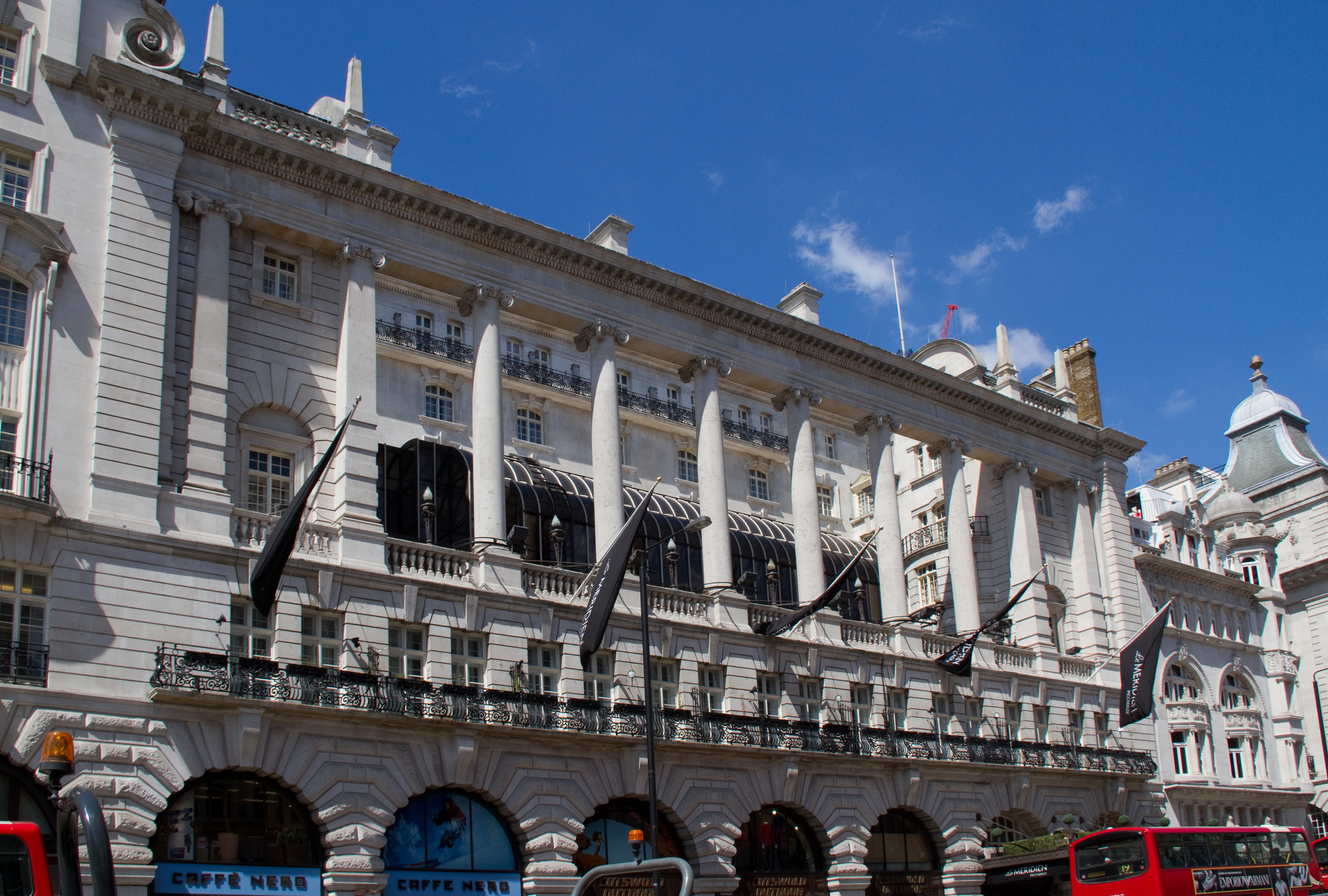 Le Meridien Hotel